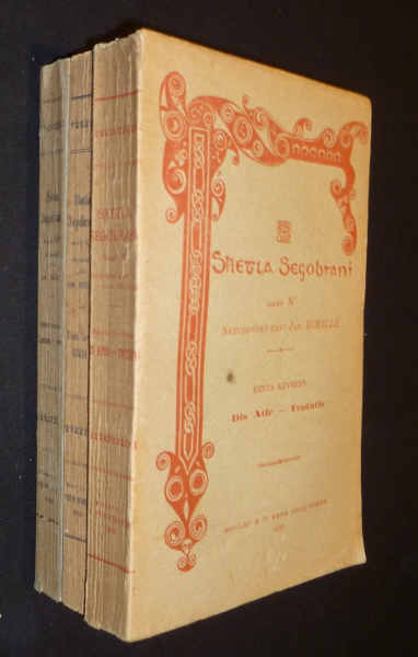 An danevell a oa bet embannet e stumm teir levrenn, war baper kozh.